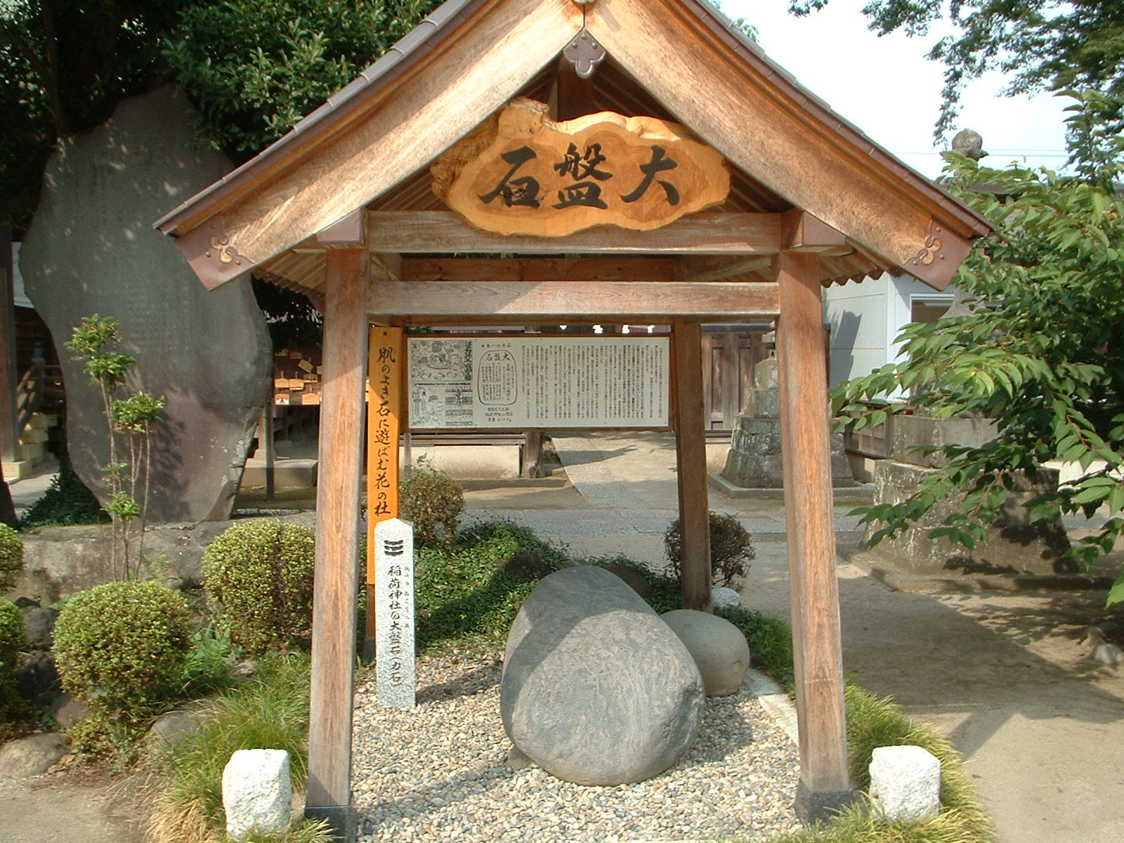 日本で最も大きい力石